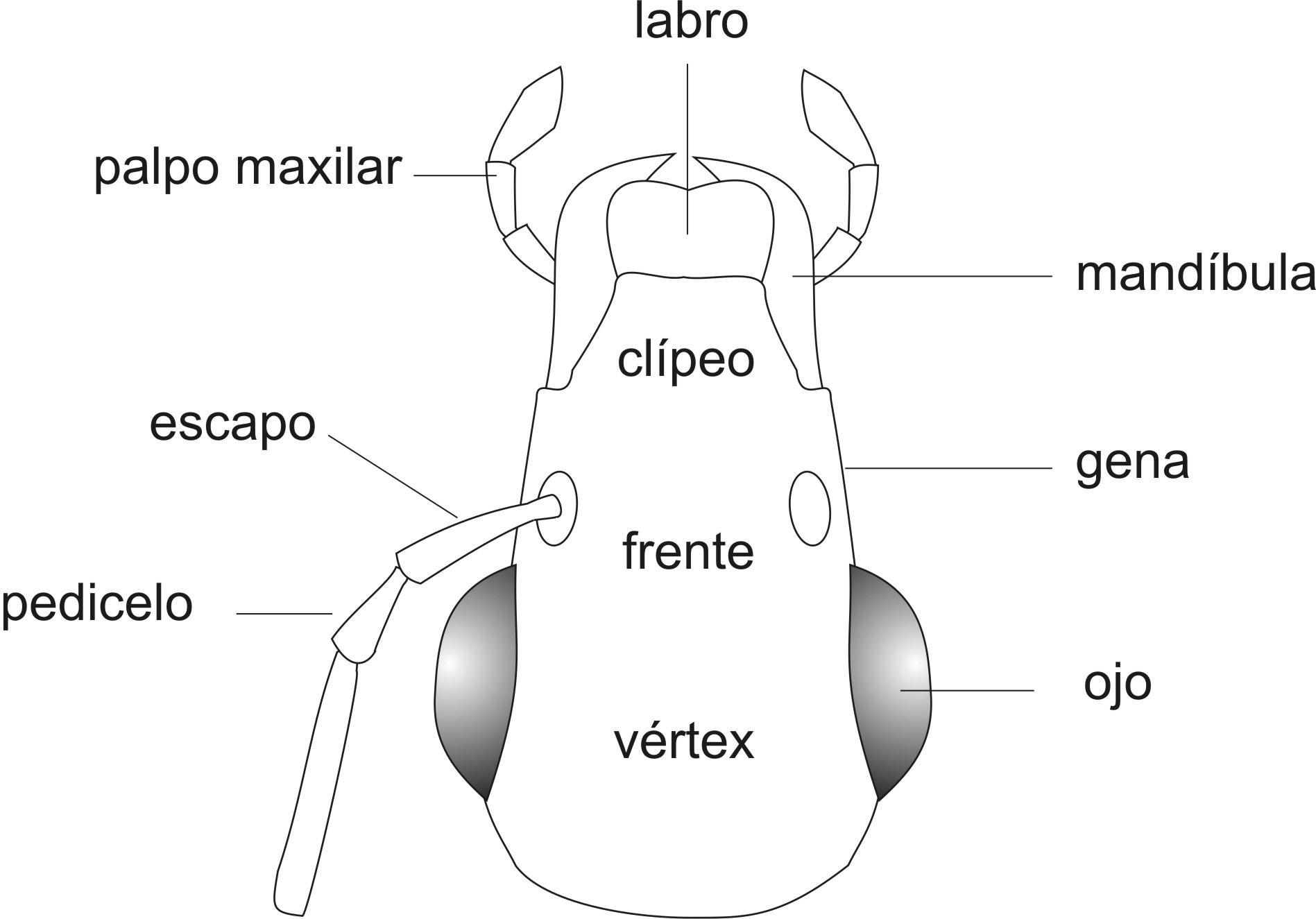 Morfología externa de la cabeza de un coleóptero